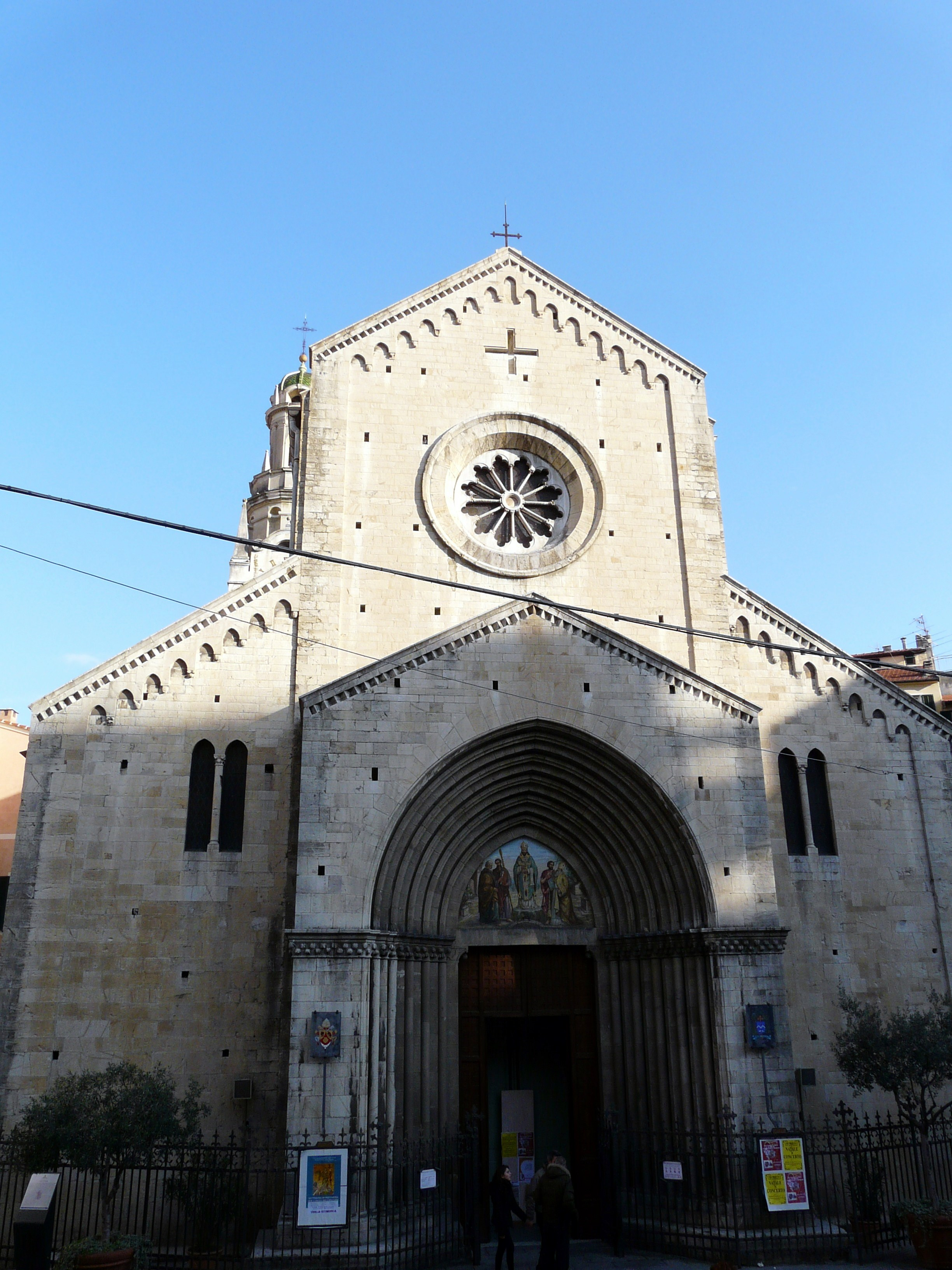 Cattedrale di San Siro, Sanremo, Liguria, Italia